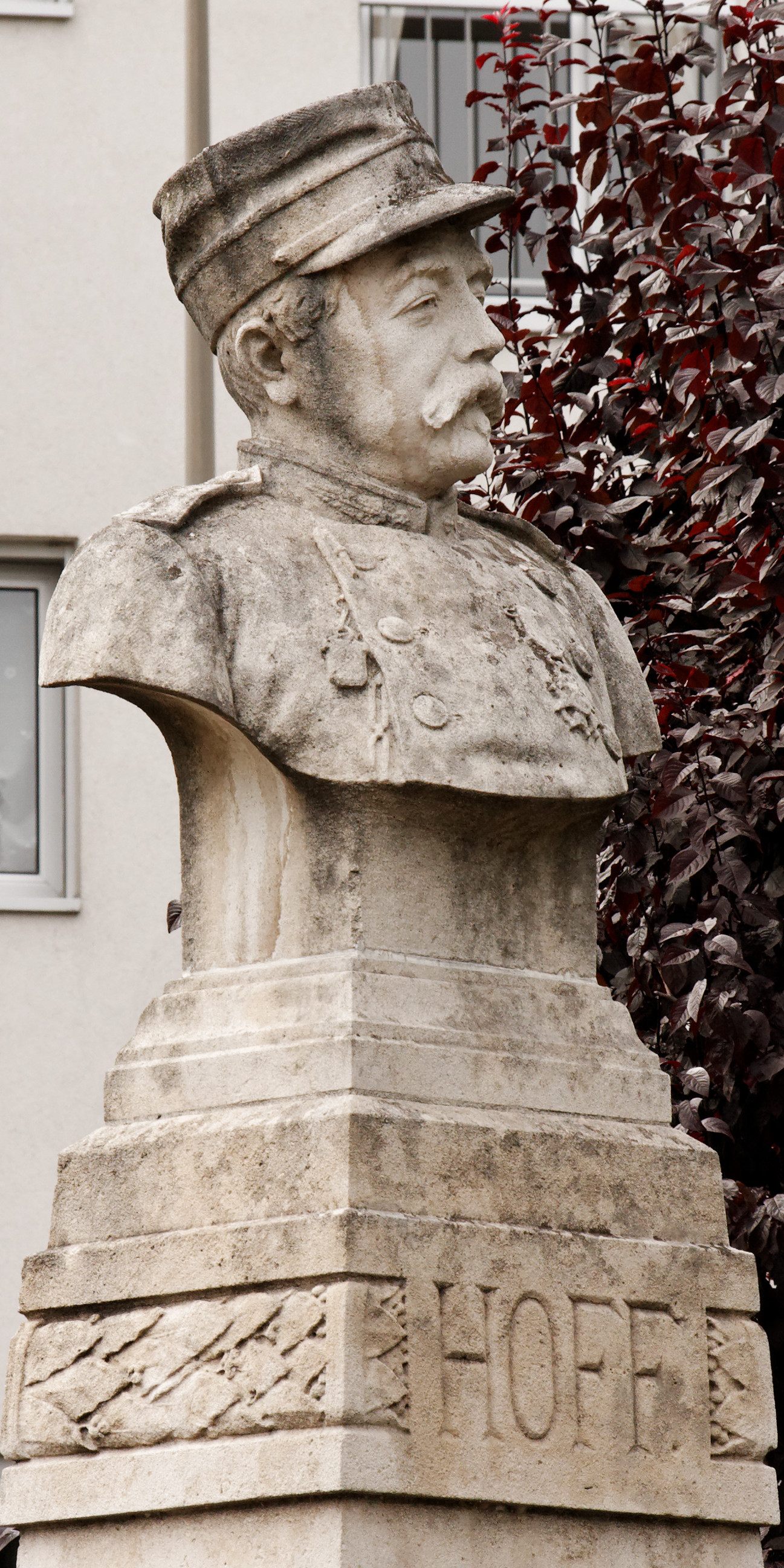 Monument commémoratif du sergent Ignace Hoff, guerre de 1870-71. Détails du buste